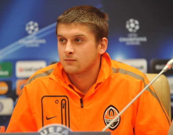 Ярослав Ракицкий на пресс-конференции перед матчем Лиги чемпионов Шахтёр-Барселона в 2011 году